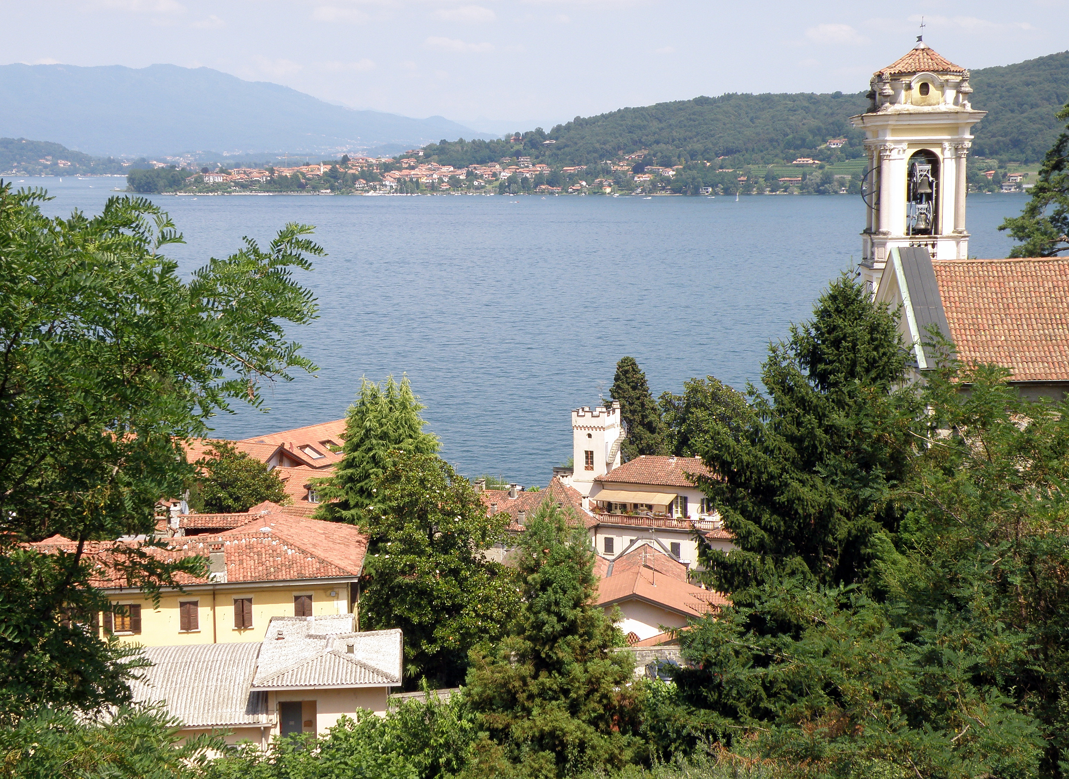 Meina (NO), sul Lago Maggiore. Veduta.